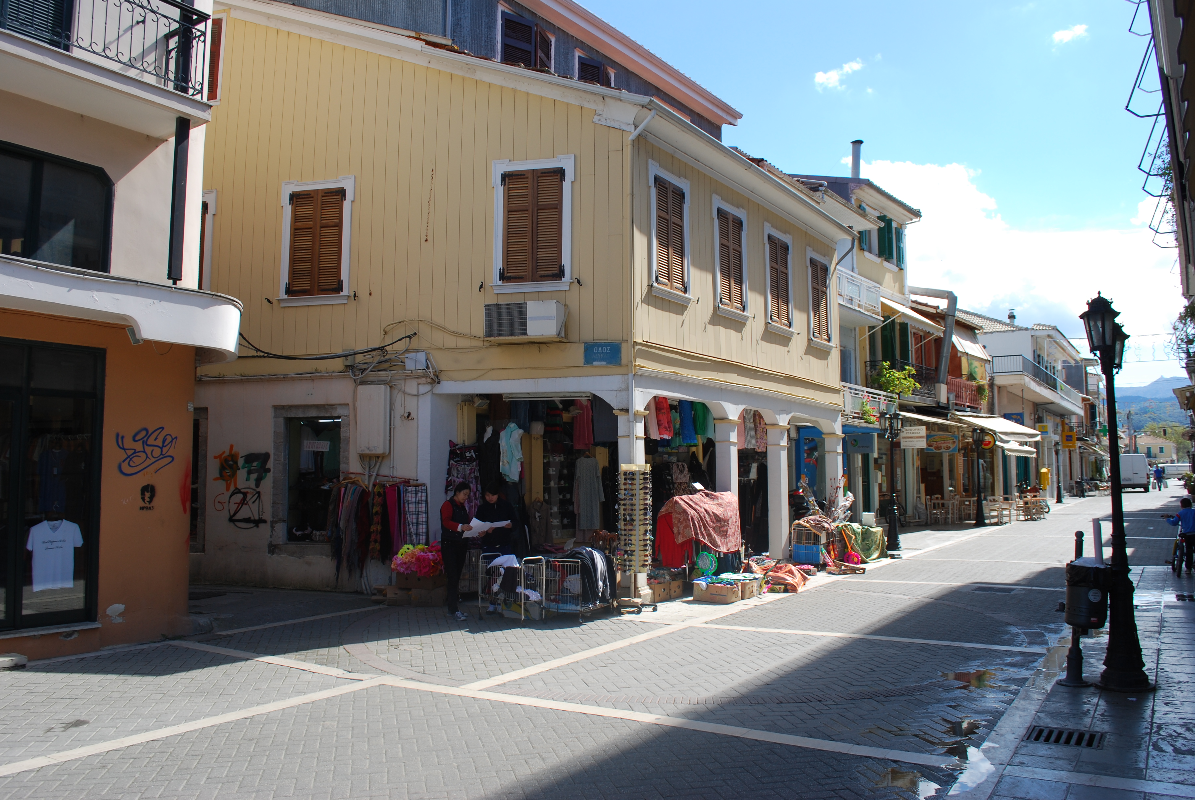 Vue de Lefkada.